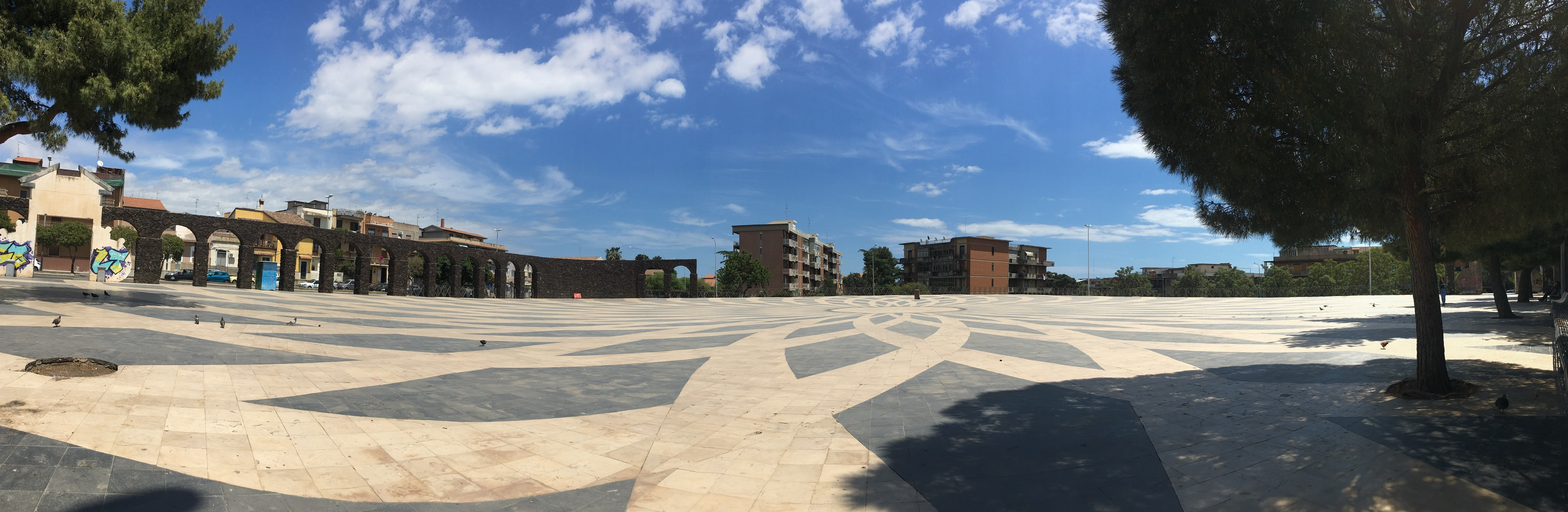 Spiazzo di piazza de I Viceré